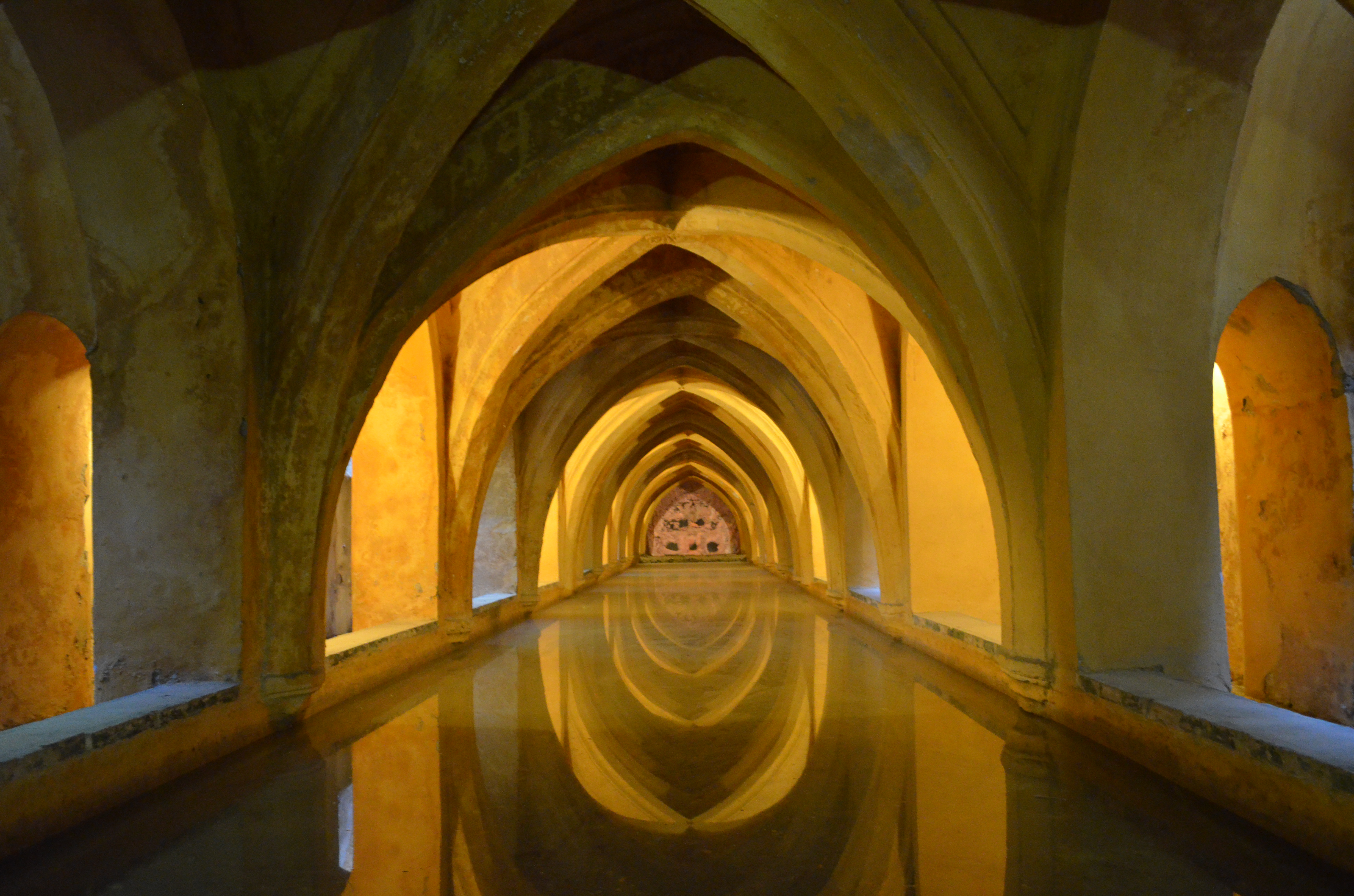 Real Alcazar Sevilla